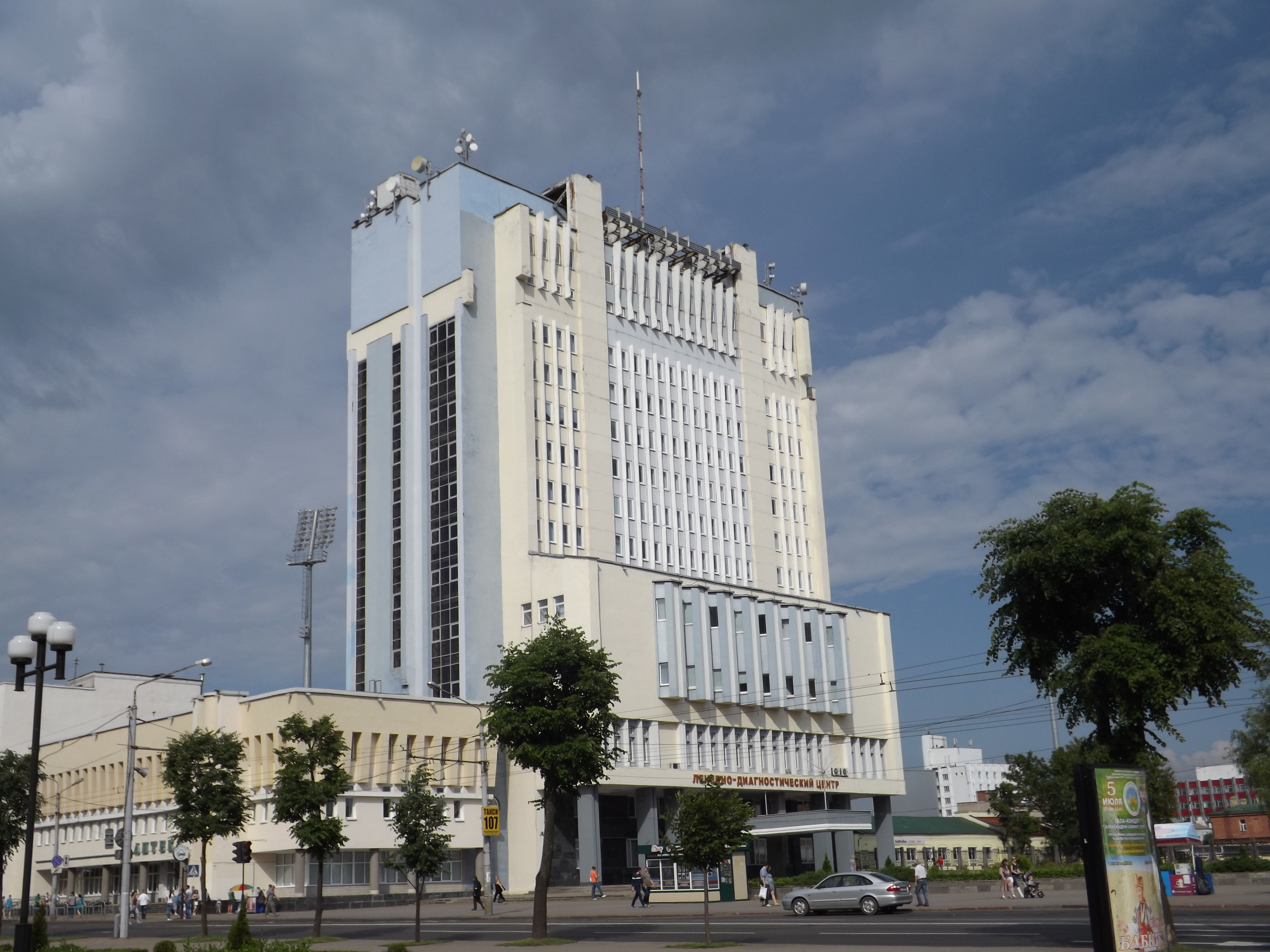 Lieninski District, Mogilev, Belarus